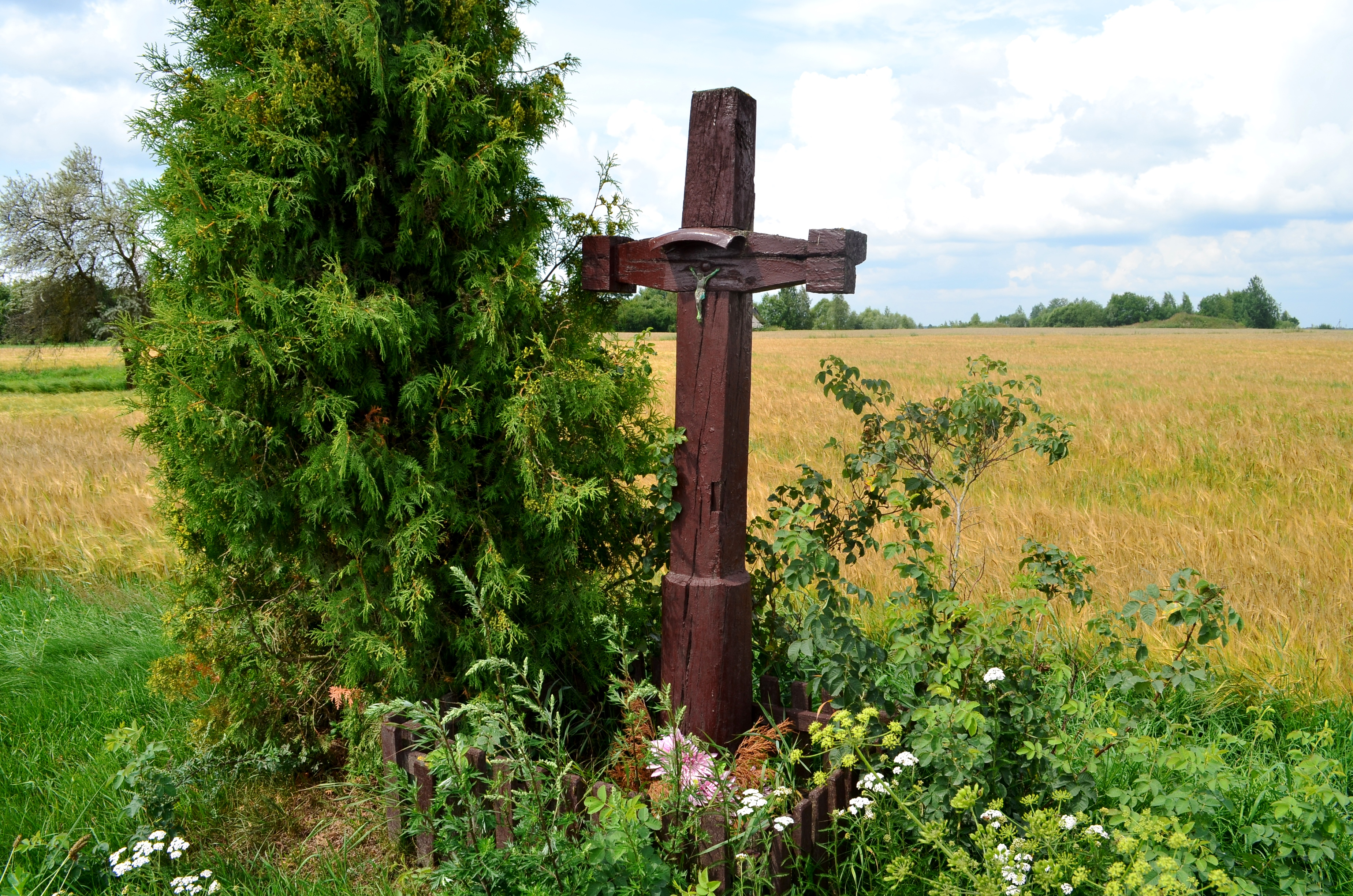 Kryžius, Liolių k., Šėtos sen., Kėdainių raj.